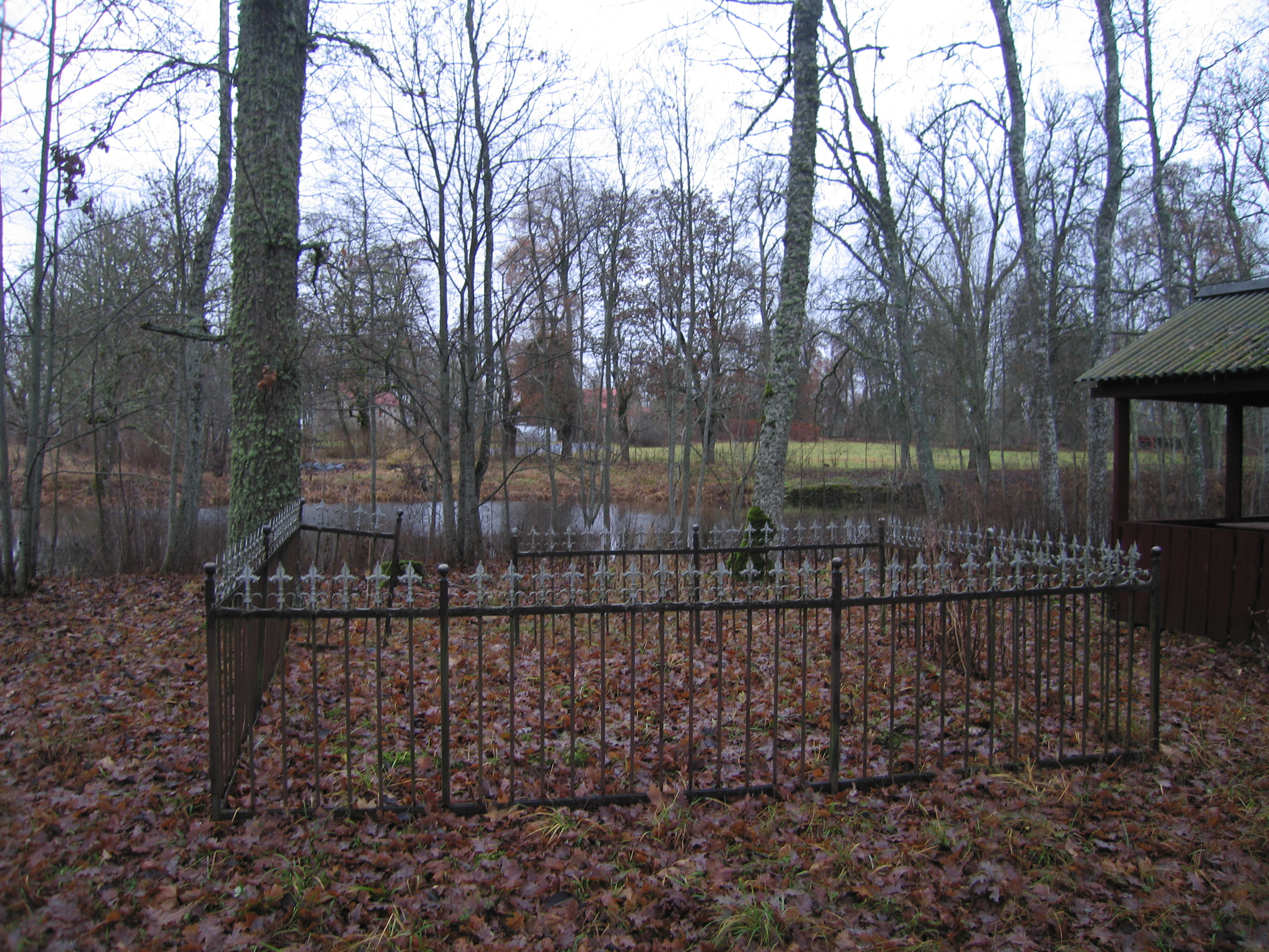 Kalmistult üle tiigi on Mädapea mõisa peahoone